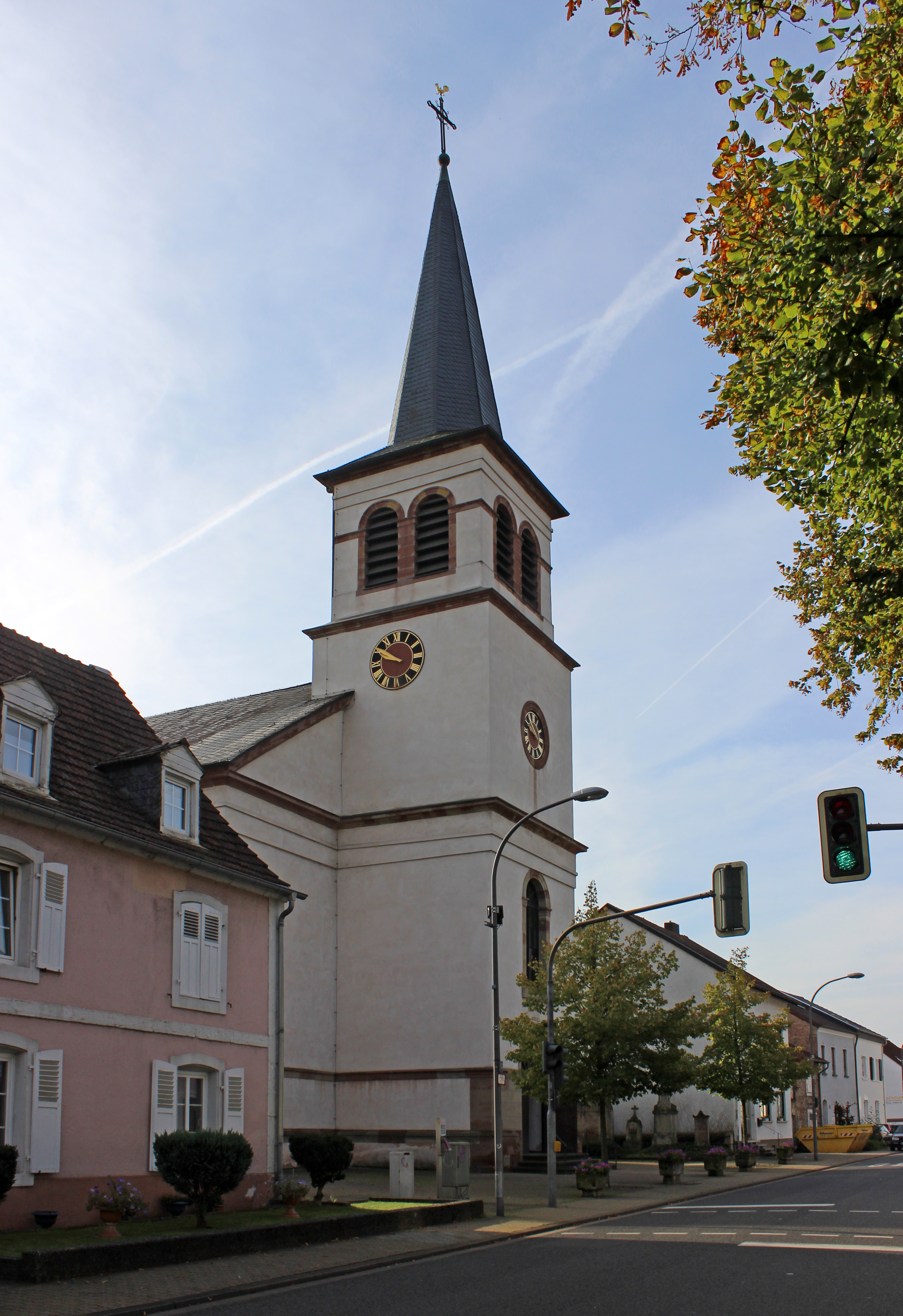 Kath. Pfarrkirche St. Petrus und Paulus in Beaumarais, Stadt Saarlouis, Saarland